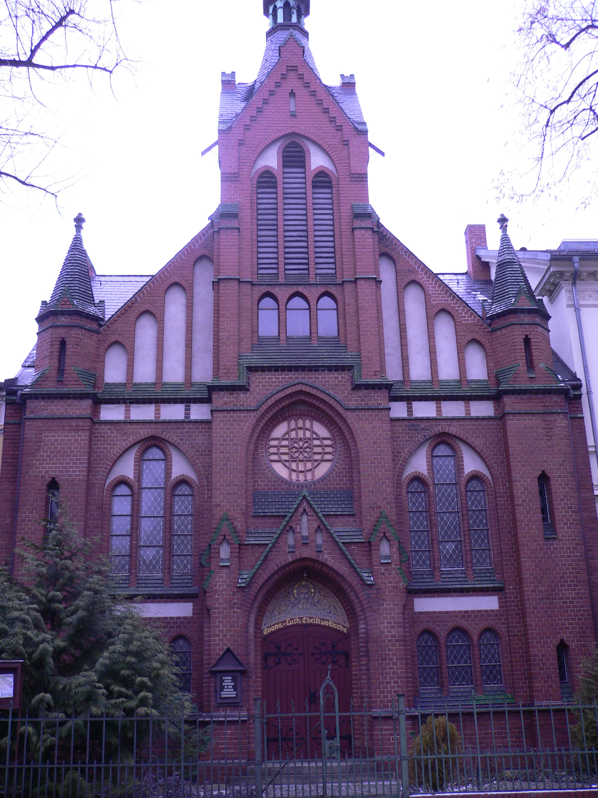 Altlutherische Christuskirche Potsdam